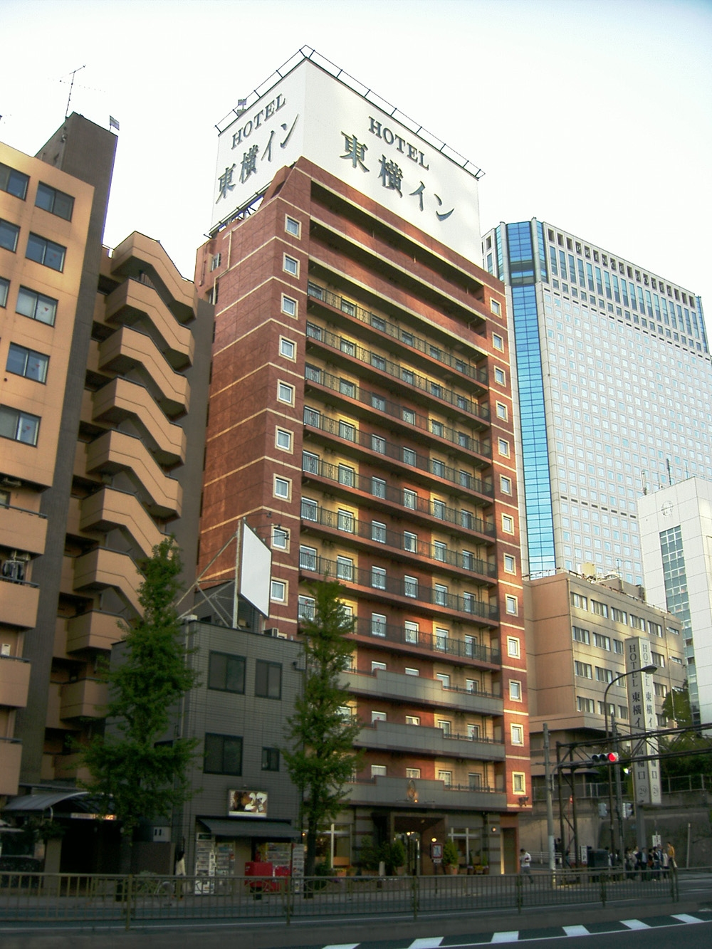 Hotel_Toyoko_Inn_Takanawa